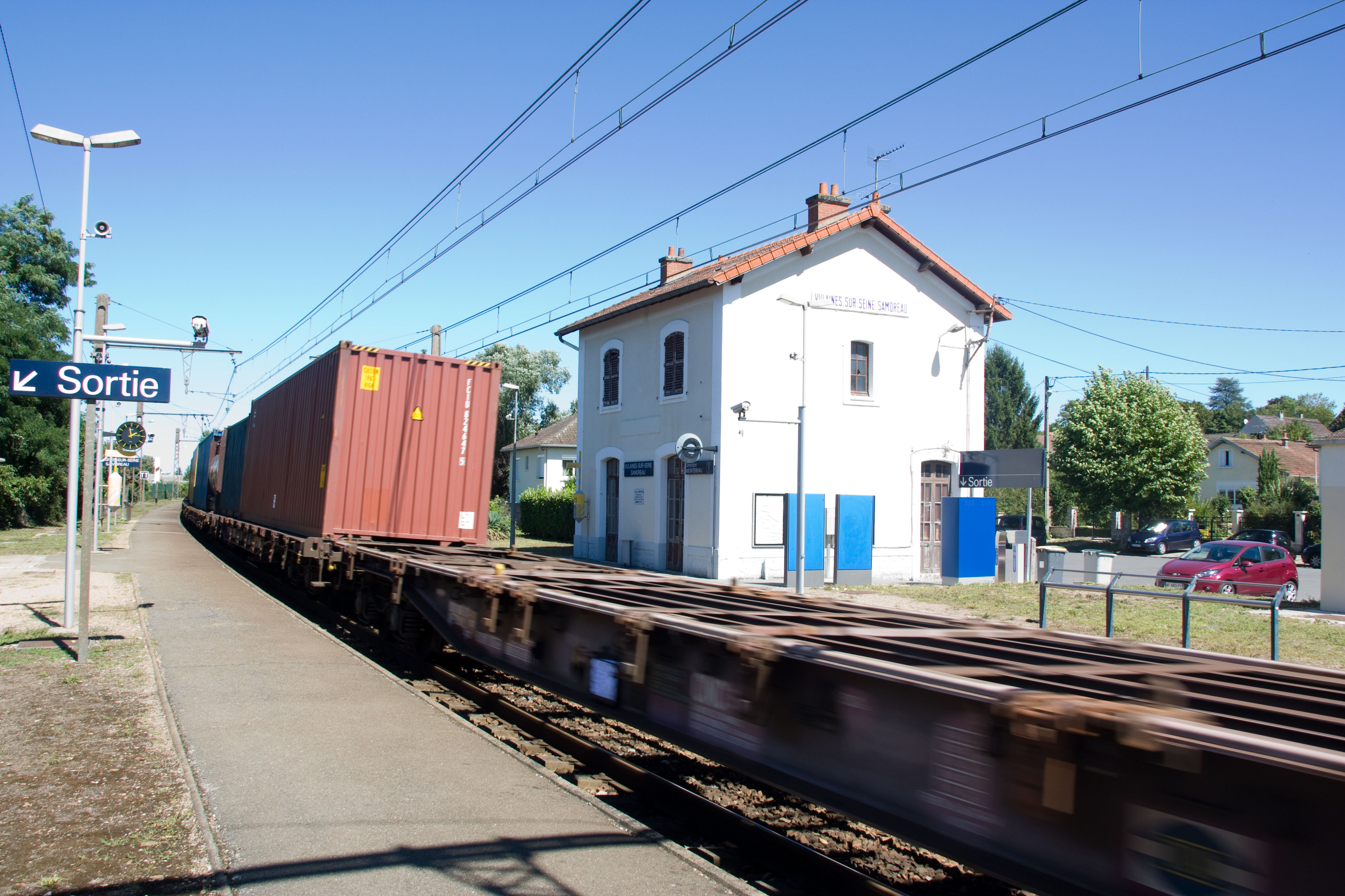 Gare de Vulaines-sur-Seine - Samoreau, Vulaines-sur-Seine, Seine-et-Marne, France